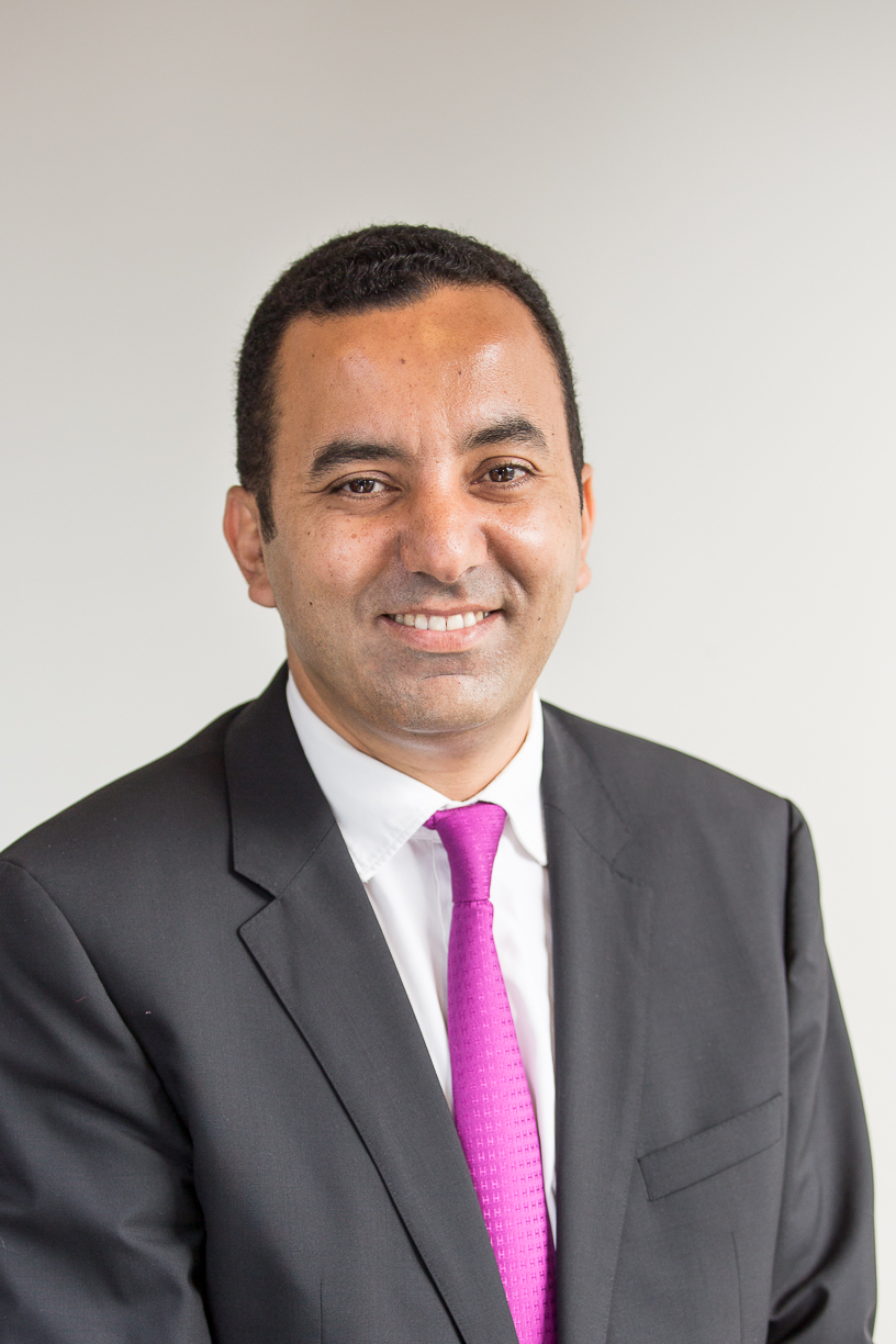 Mehdi El Idrissi